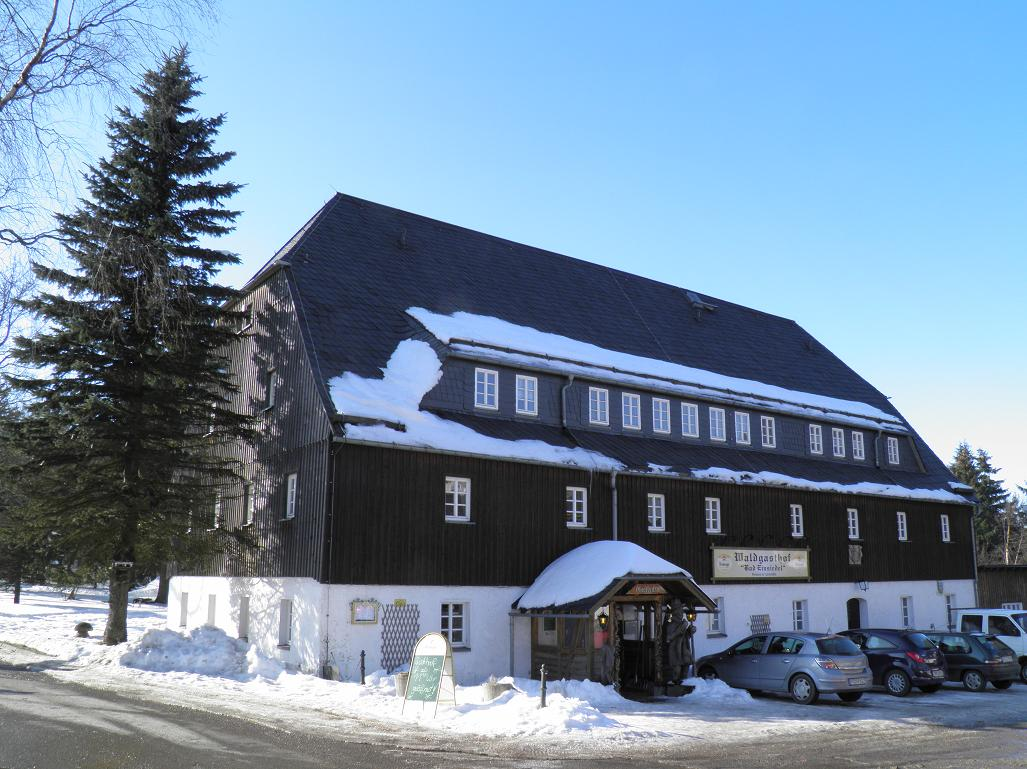 Bad Einsiedel, Waldgasthof im Winter 2014/15